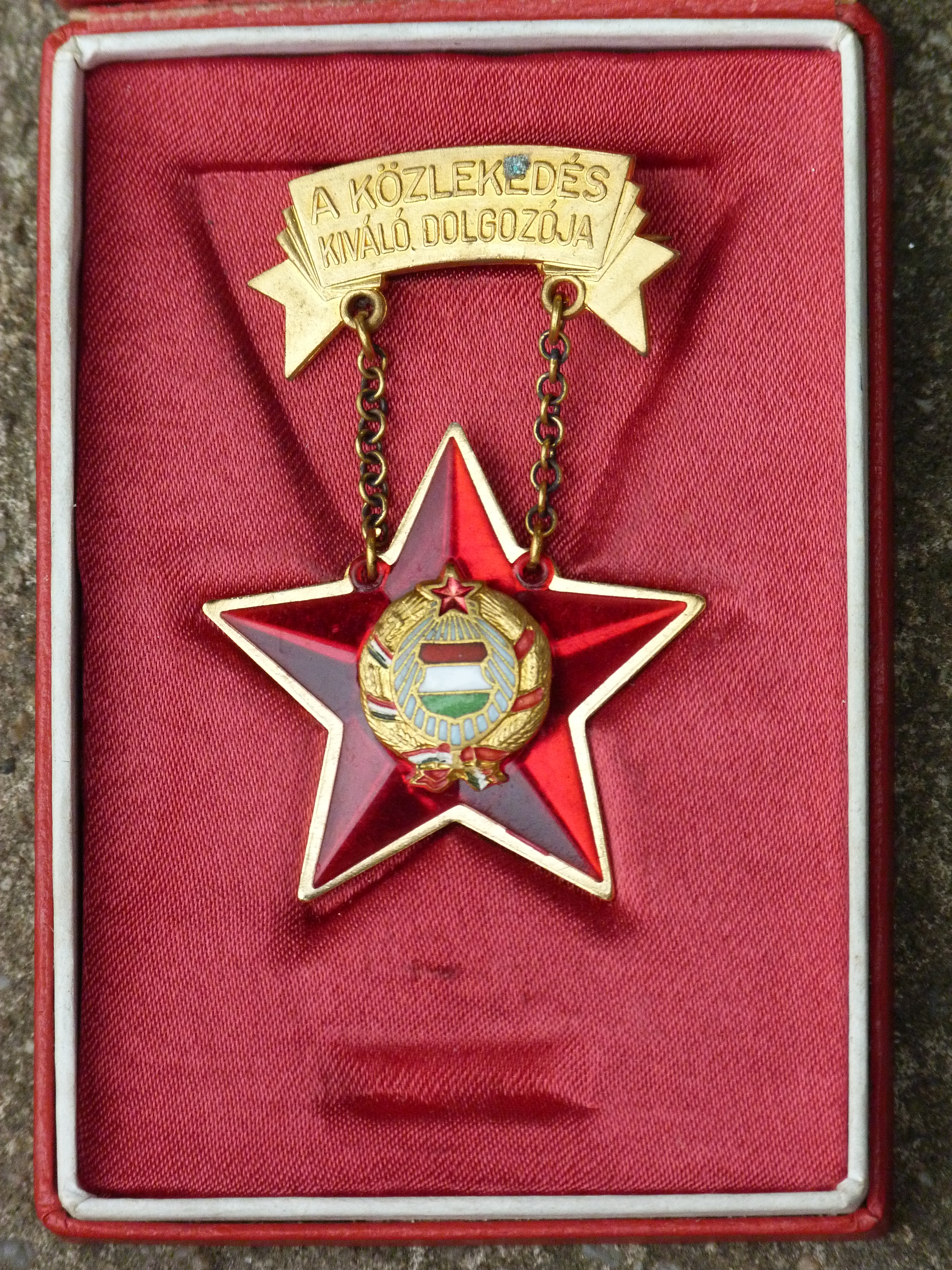 A felvétel 2015. január 9-én, pénteken készült Budapesten. Jelvény: A Közlekedés Kiváló Dolgozója. ©© Derzsi Elekes Andor, Budapest, 2015, A kép másolását, bármilyen úton történő sokszorosítását és felhasználását a szerző ellenérték nélkül, jogutódjaira is kihatóan megengedi. Az engedély kiterjed a kereskedelmi célú hasznosításra is. Kéri azonban nevének feltüntetését a felhasználás során. A Metapolisz sorozat valamennyi képe és filmje Creative Commons alatti valamint kereskedelmi - for profit - célra is felhasználható. Ajánlott hivatkozás: Derzsi Elekes Andor: Metapolisz DVD line